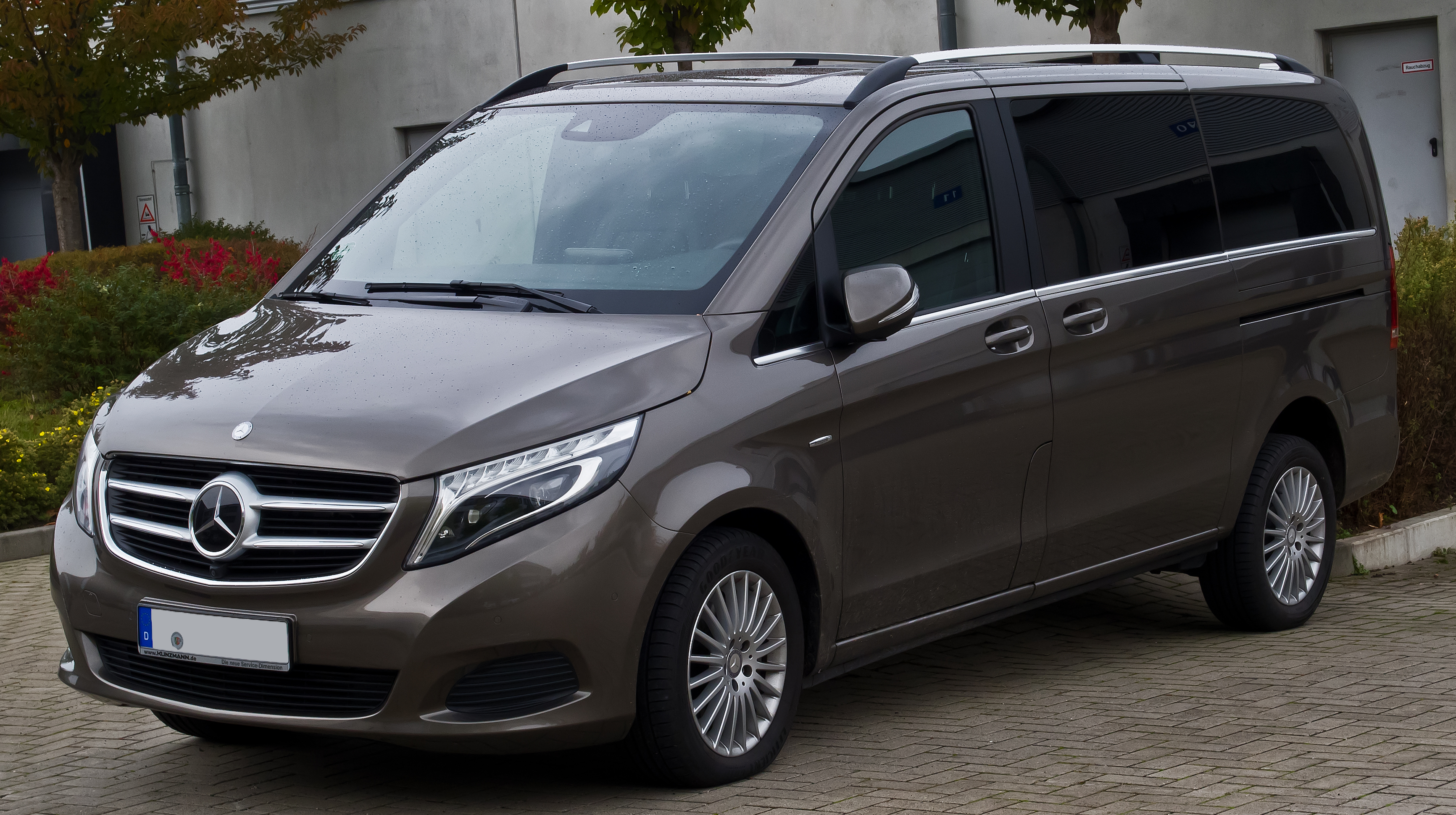 Mercedes-Benz V-Klasse Avantgarde Lang (V 447)